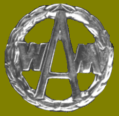 Odznaka podchorążych Wojskowej Akademii Medycznej w Łodzi, wzór z r. 1963